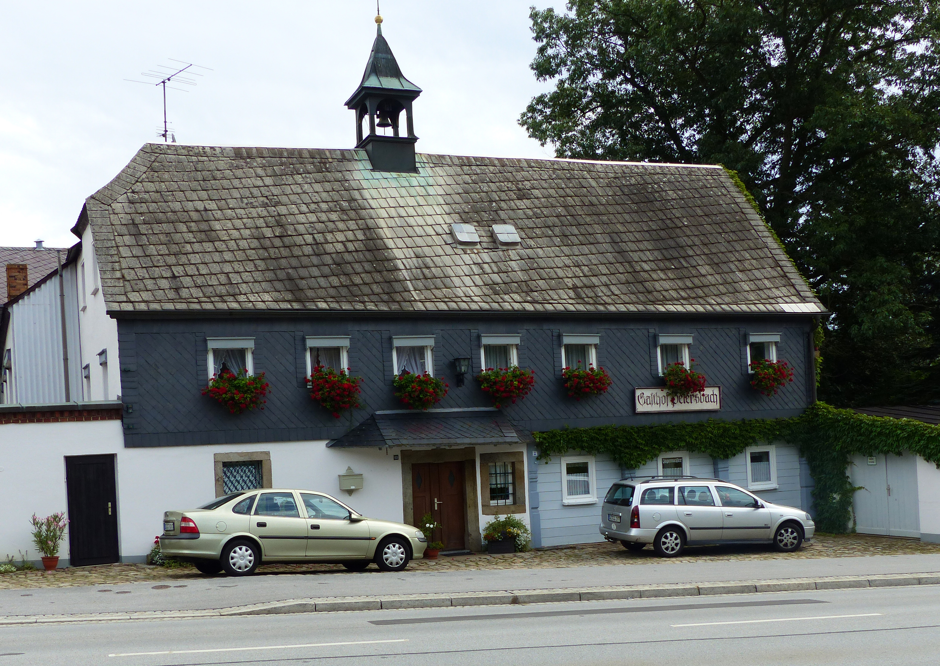 Umgebindehaus, Gasthof, Sohlander Straße 69, Schirgiswalde, Schirgiswalde-Kirschau